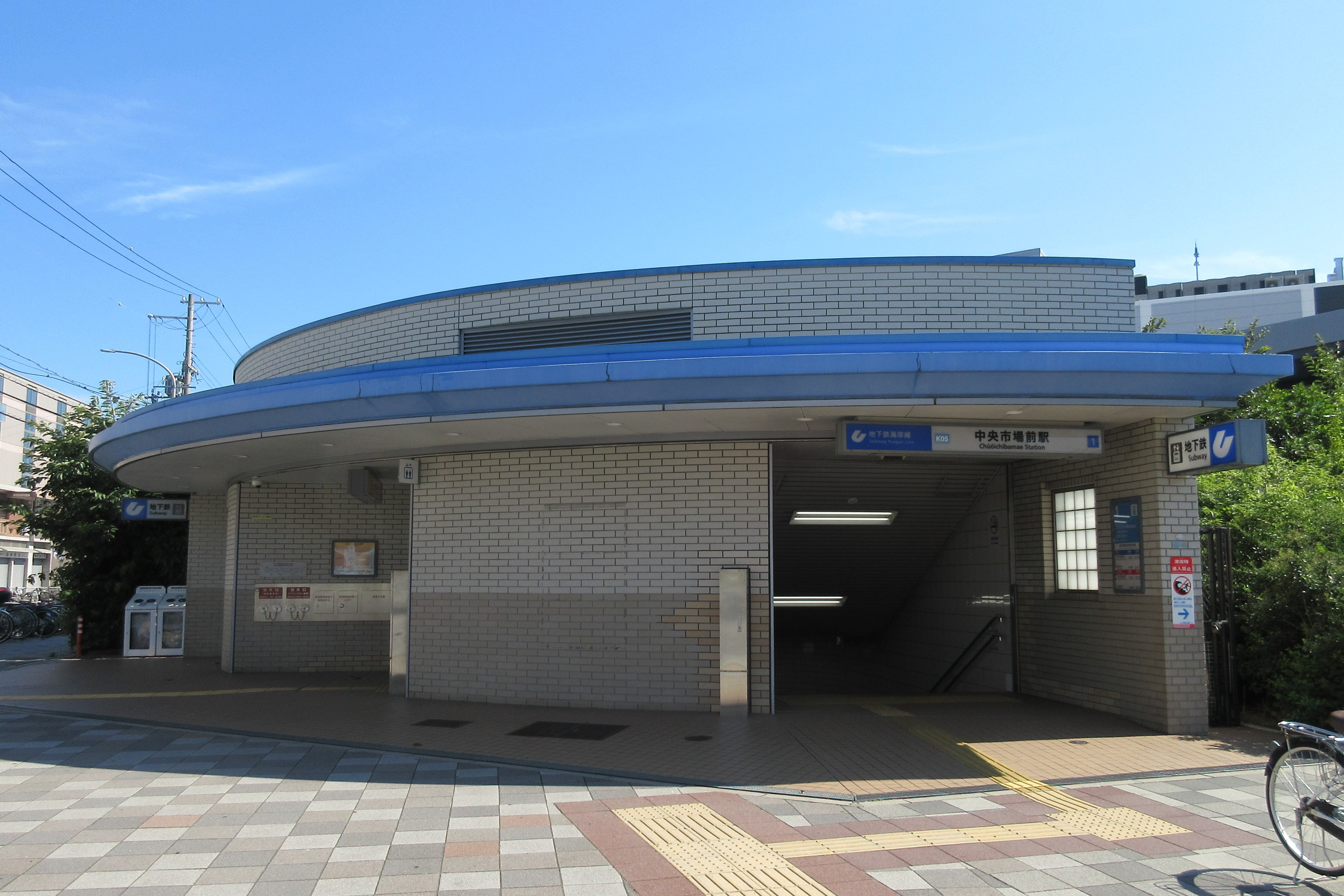 神戸市営地下鉄海岸線中央市場前駅